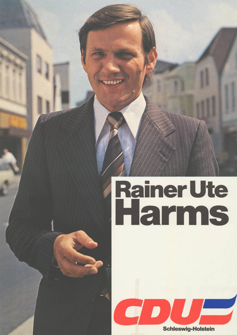 Rainer Ute Harms CDU Schleswig-Holstein Abbildung: Foto Plakatart: Kandidaten-/Personenplakat mit Porträt Auftraggeber: Verantw.: CDU Schleswig-Holstein Objekt-Signatur: 10-012 : 419 Bestand: Landtagswahlplakate Schleswig-Holstein (10-012) GliederungBestand10-18: Landtagswahlplakate Schleswig-Holstein (10-012) » Landtagswahl am 29.4.1979 » Ankündigungsplakate Lizenz: KAS/ACDP 10-012 : 419 CC-BY-SA 3.0 DE